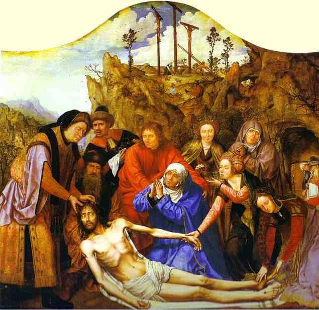 central panel